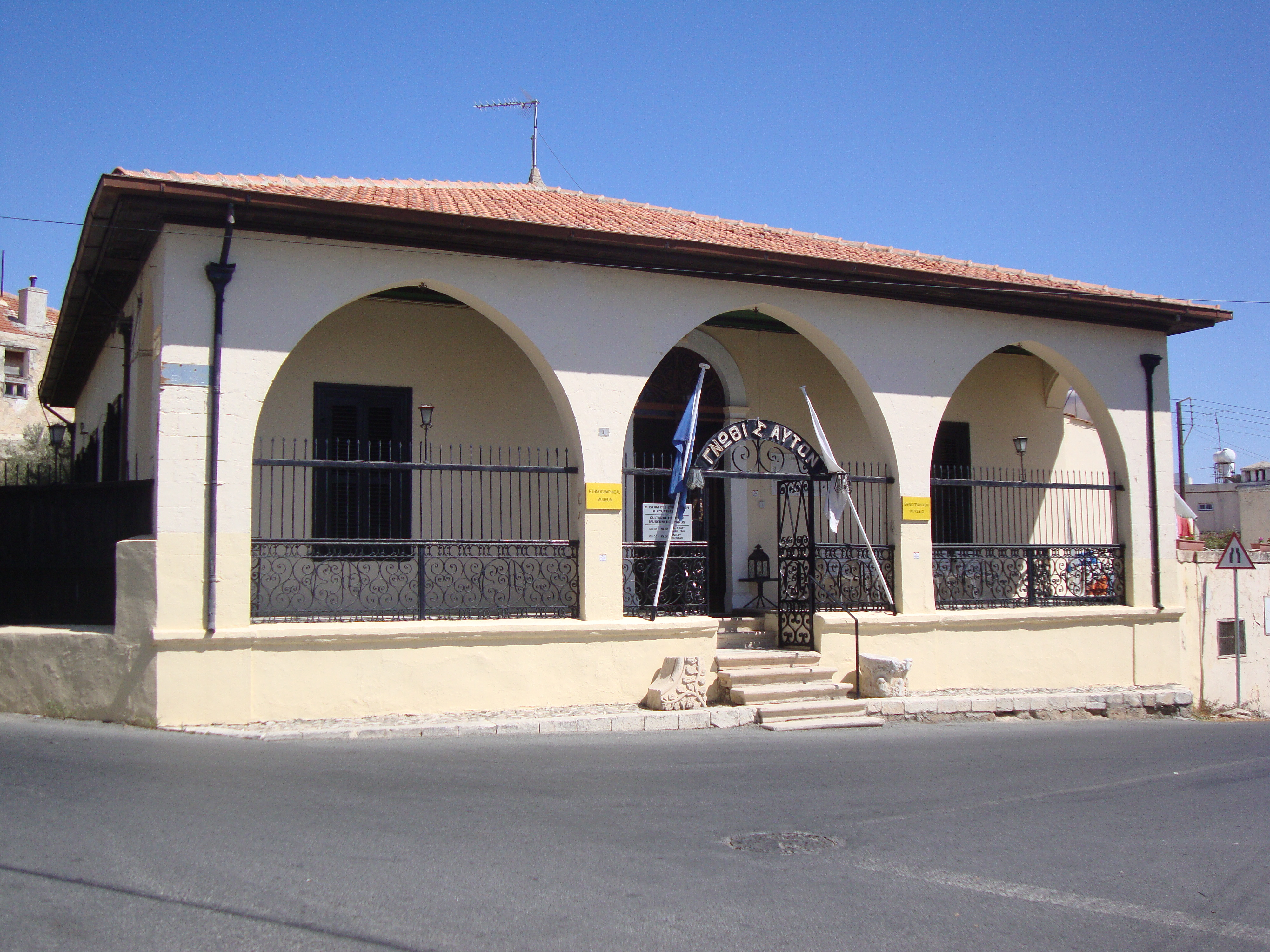 Этнографический музей Пафоса (09.2013)